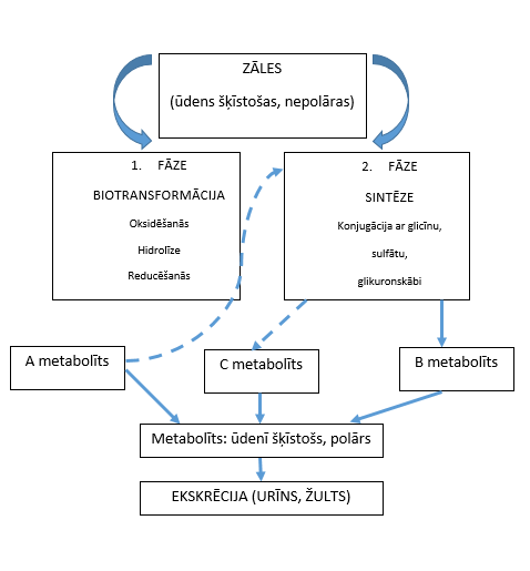 metabolisma shēma